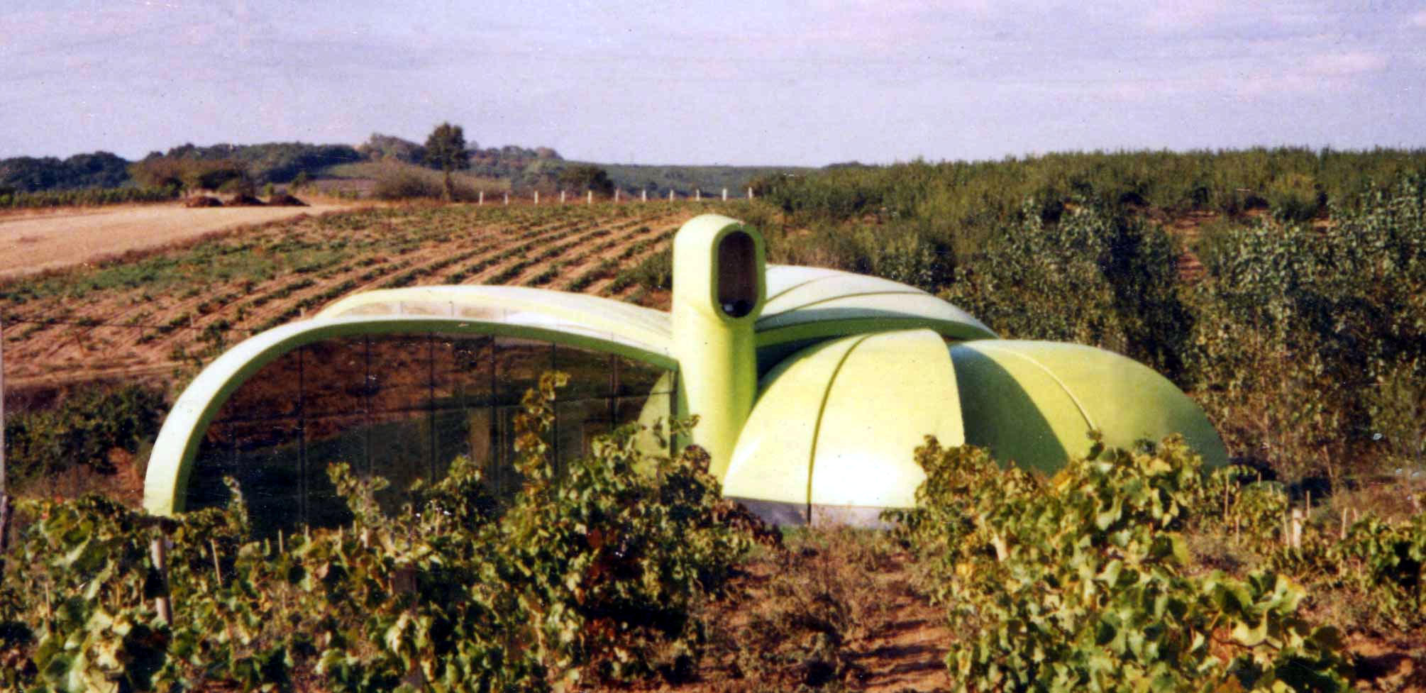 Maison bioclimatique en matériaux composite ( pierre broyée, fibre de verre et résine), Architecte designer Pierre Colleu à Crozes-Hermitage France [1]